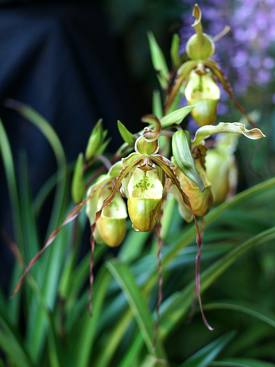 Phragmipedium tetzlaffianum